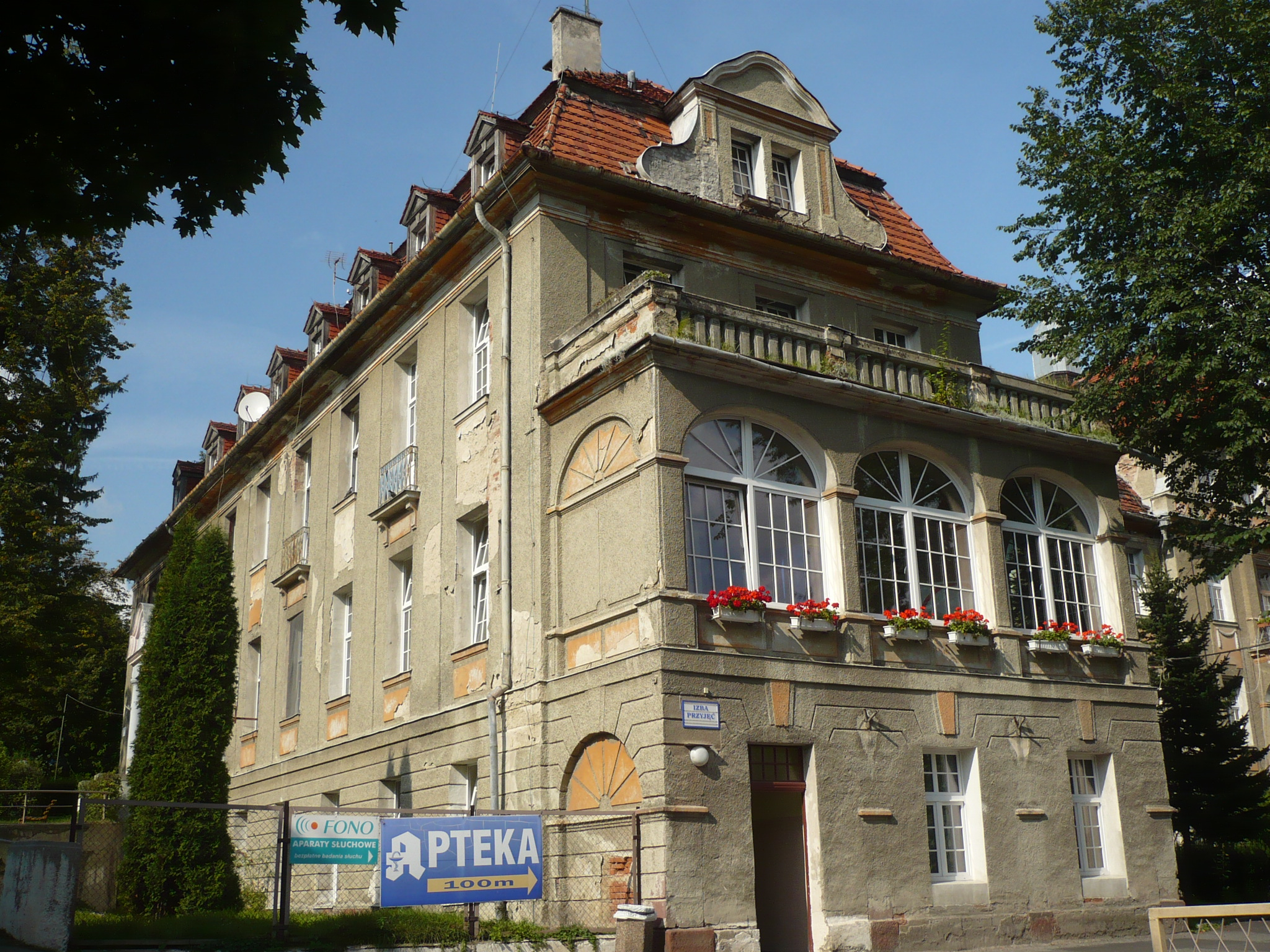 Nowa Ruda, ul. Szpitalna 2 - Szpital bracki (górniczy), 1911